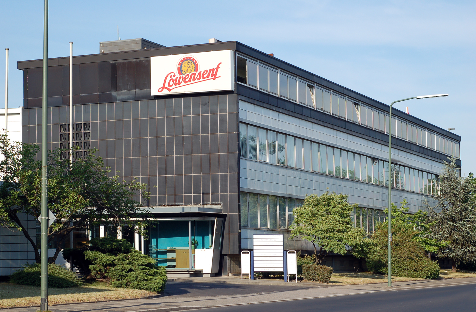 Betriebsgebäude der Düsseldorfer Löwensenf GmbH in Düsseldorf-Lichtenbroich